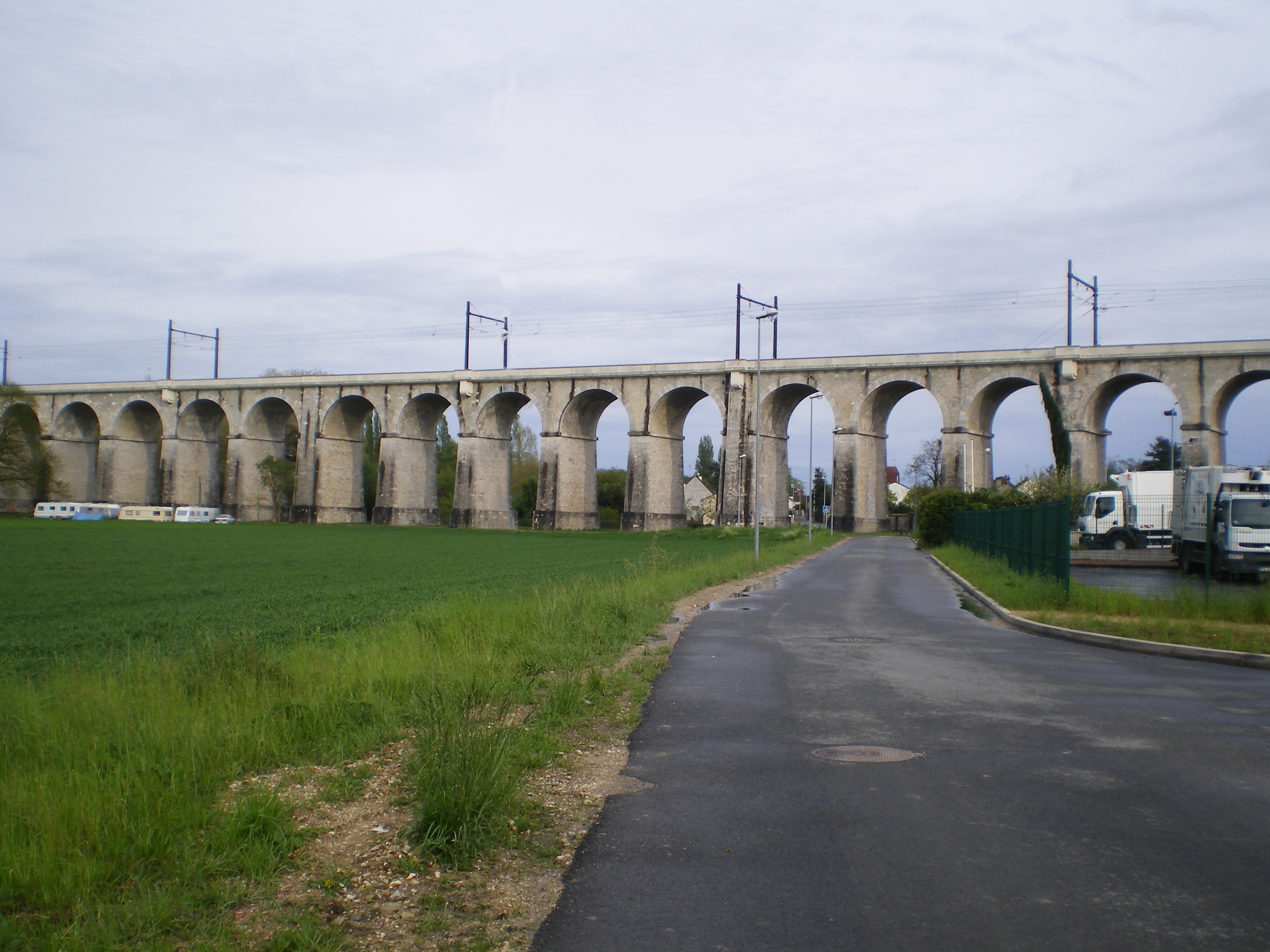 Viaduc de Moret (en fait à Veneux-les-Sablons) vu de front.